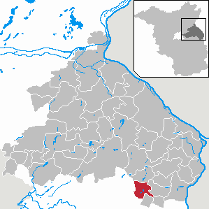 Falkenhagen (Mark) in Brandenburg (Country) - District Märkisch-Oderland